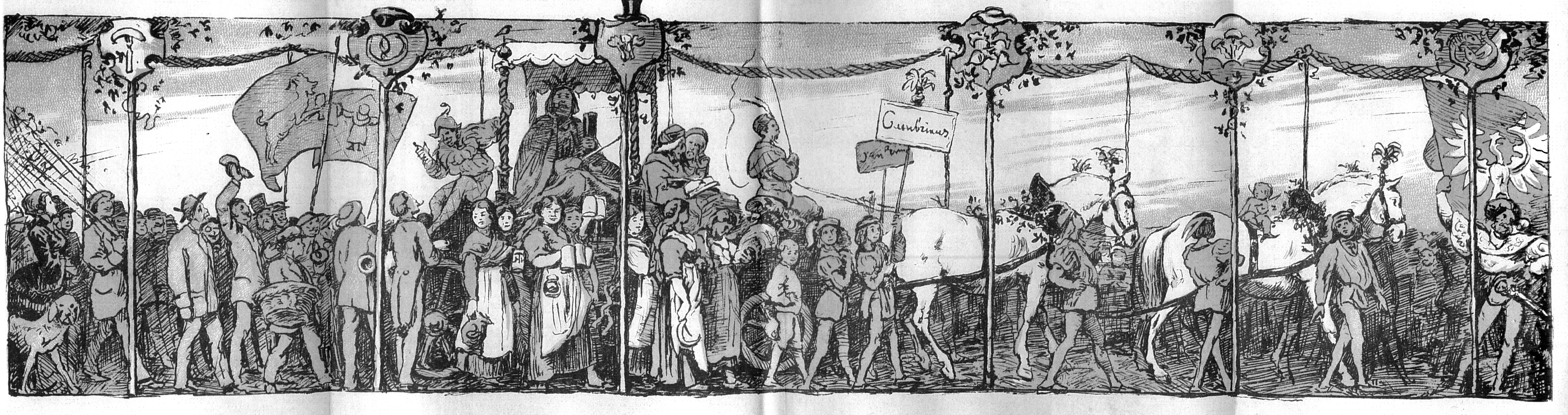 Hans Thoma: Gambrinuszug, Café Bauer, Frankfurt am Main